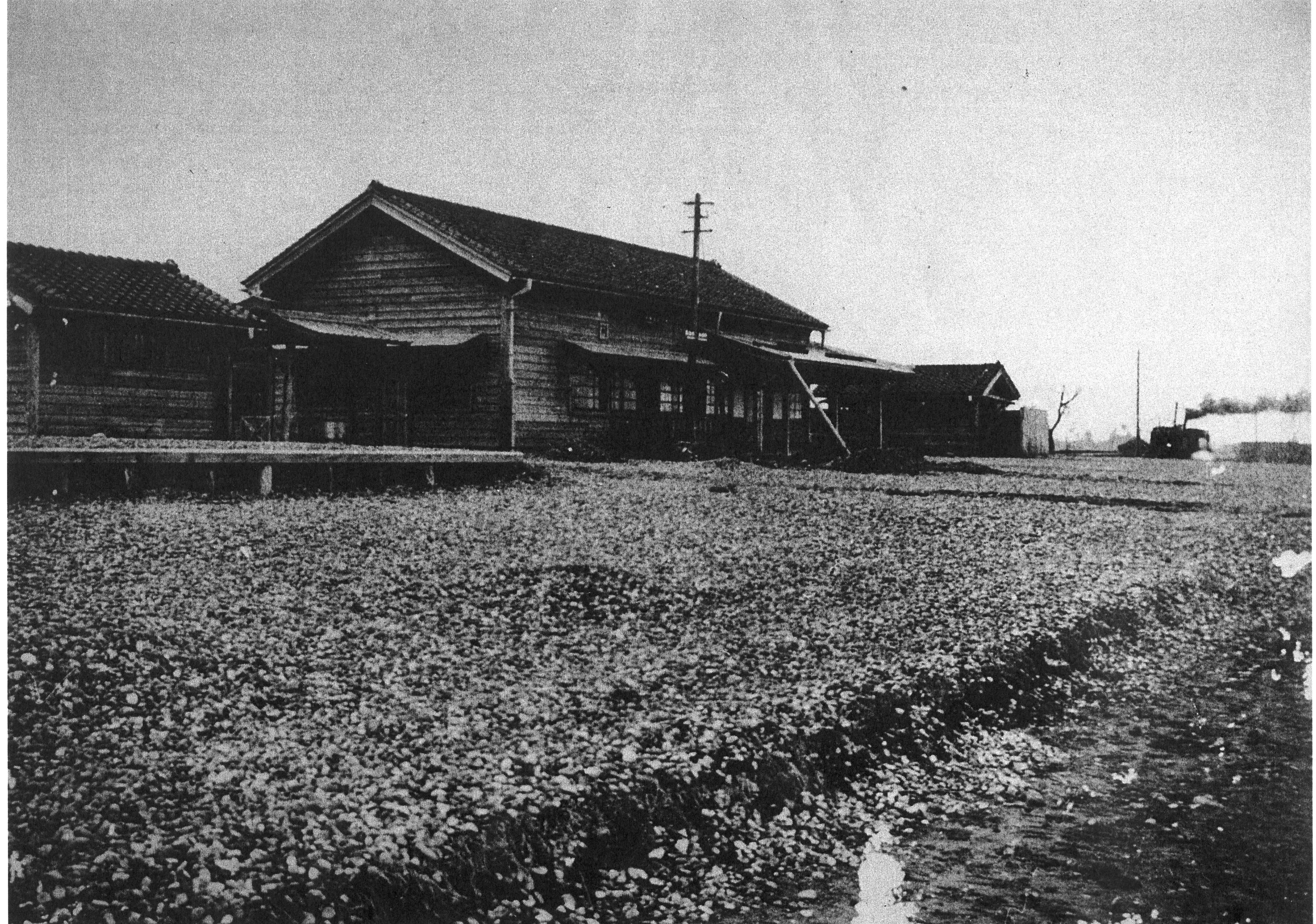 開業当時の北陸本線泊駅駅舎。